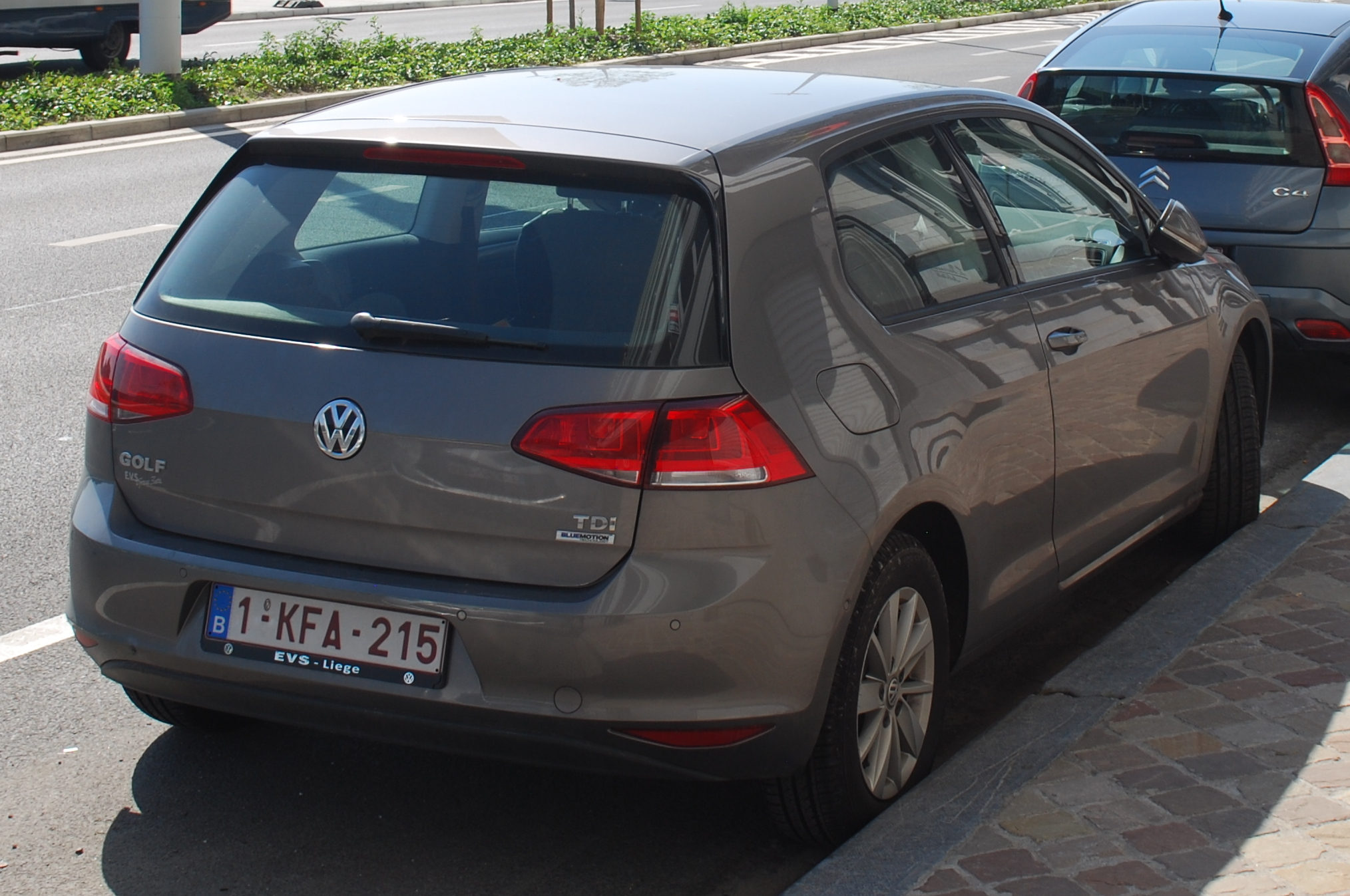 Vue de Liège